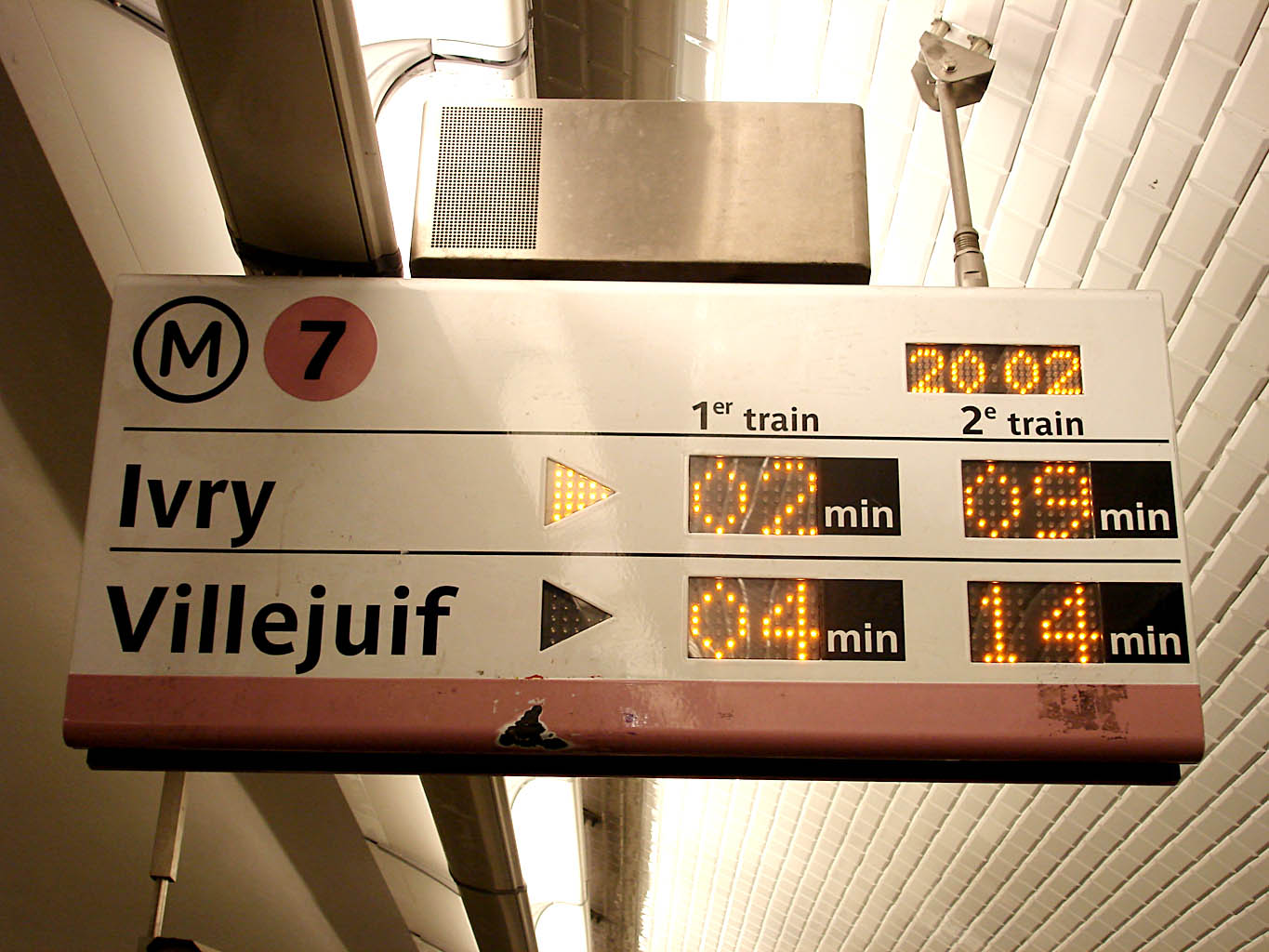 Panneau SIEL, station Opéra de la ligne 7 du métro de Paris, France.